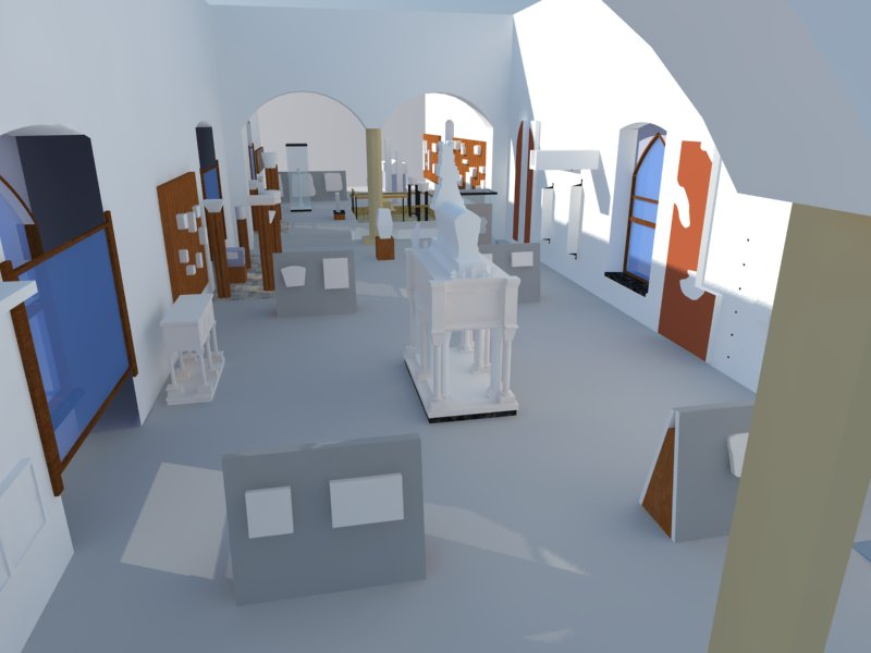 scorcio della sala